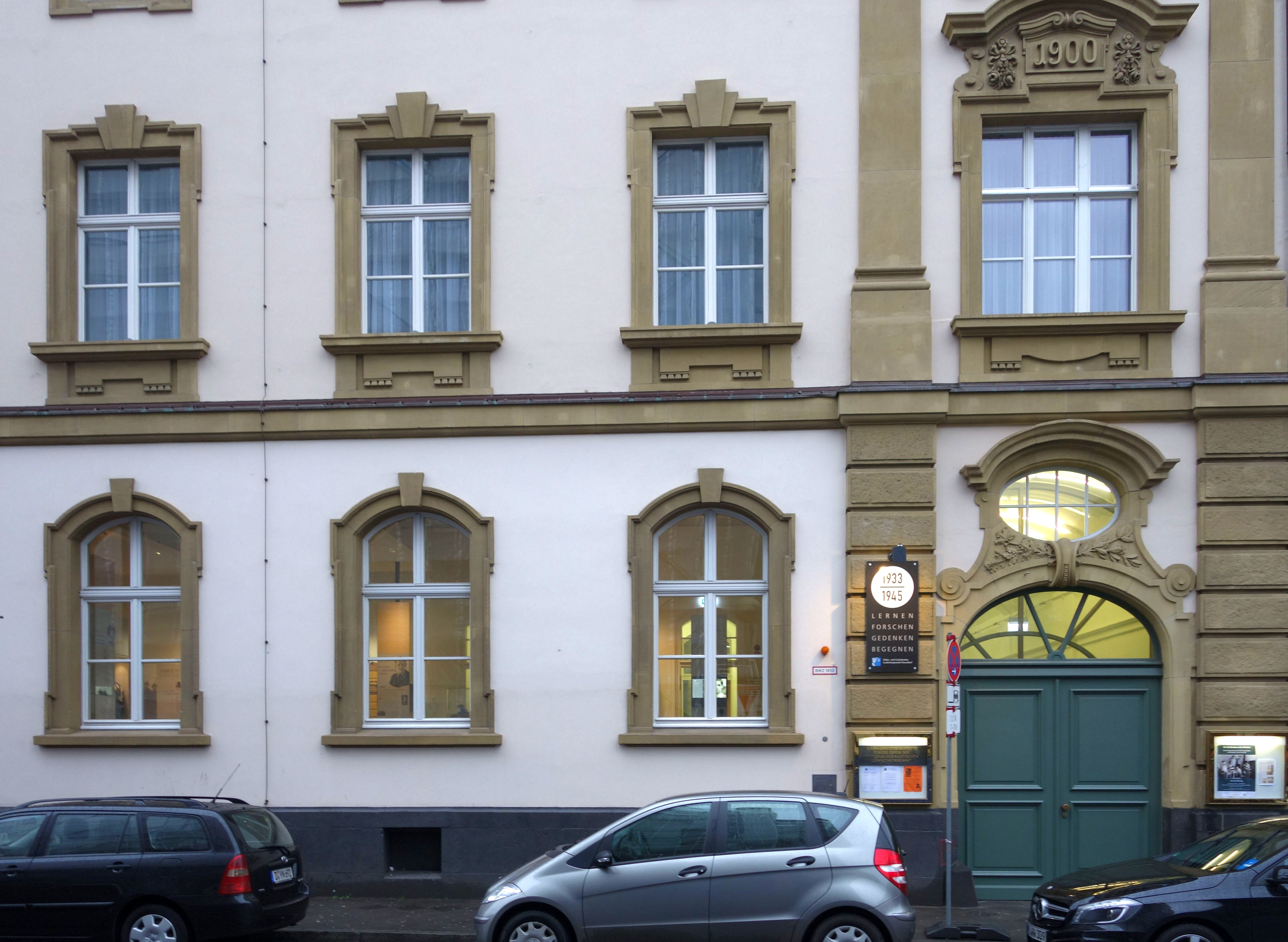 Mahn- und Gedenkstätte der Stadt Düsseldorf, März 2016 This is a photograph of an architectural monument.